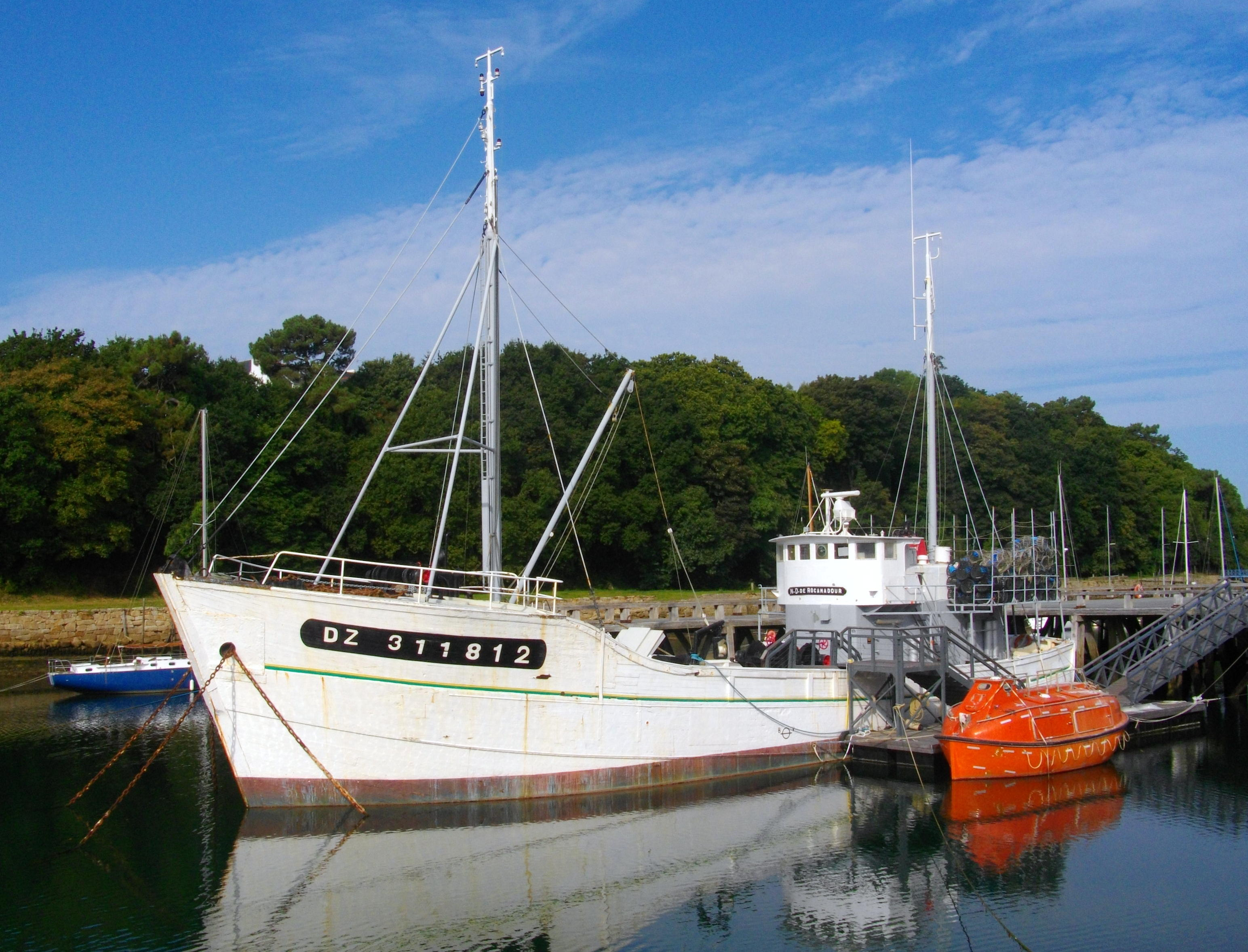 Le Notre Dame de Rocamadour, langoustier à vivier mauritanien.